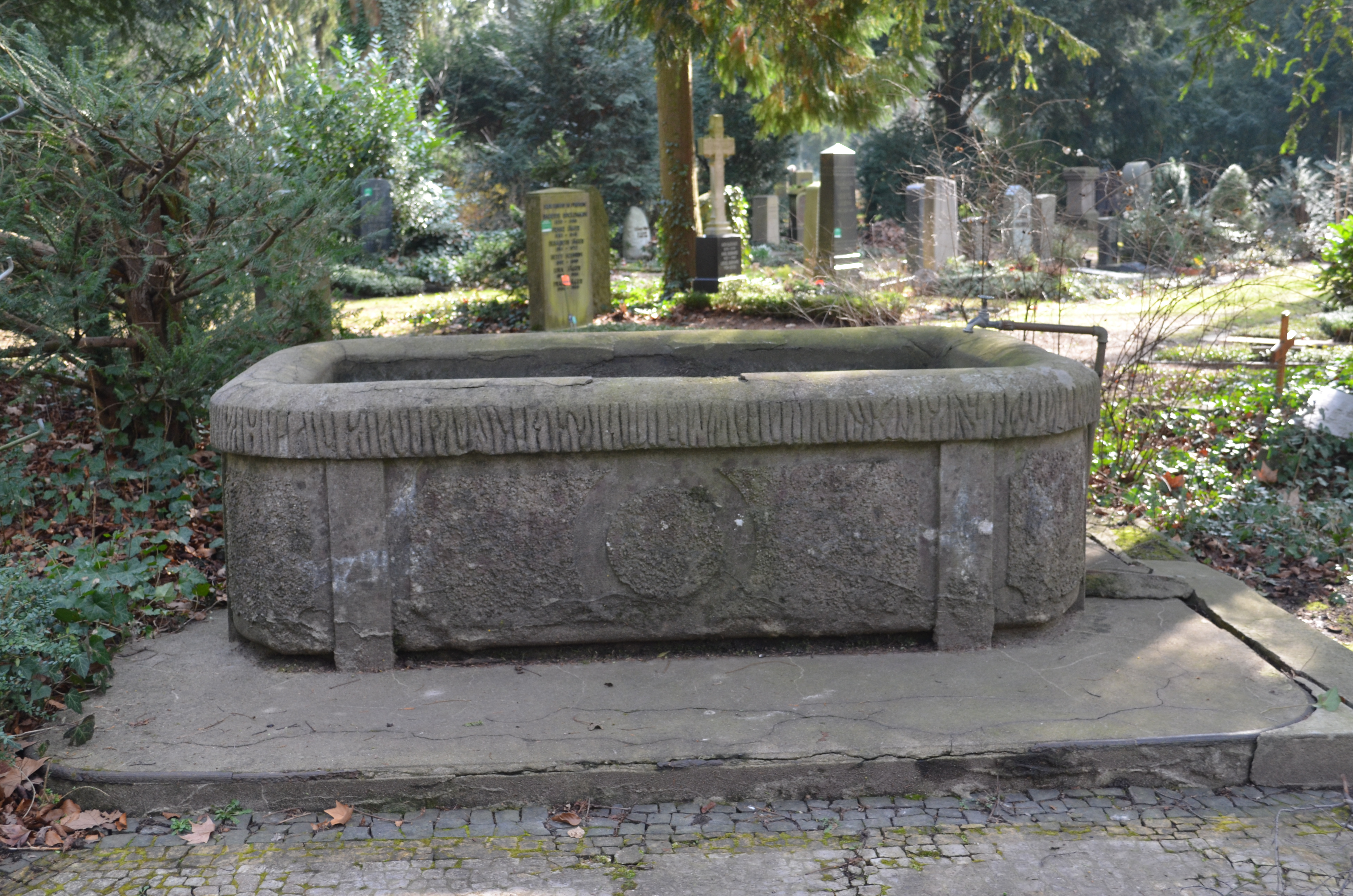 Frankfurt, Hauptfriedhof, Brunnen gegenüber H adm 548